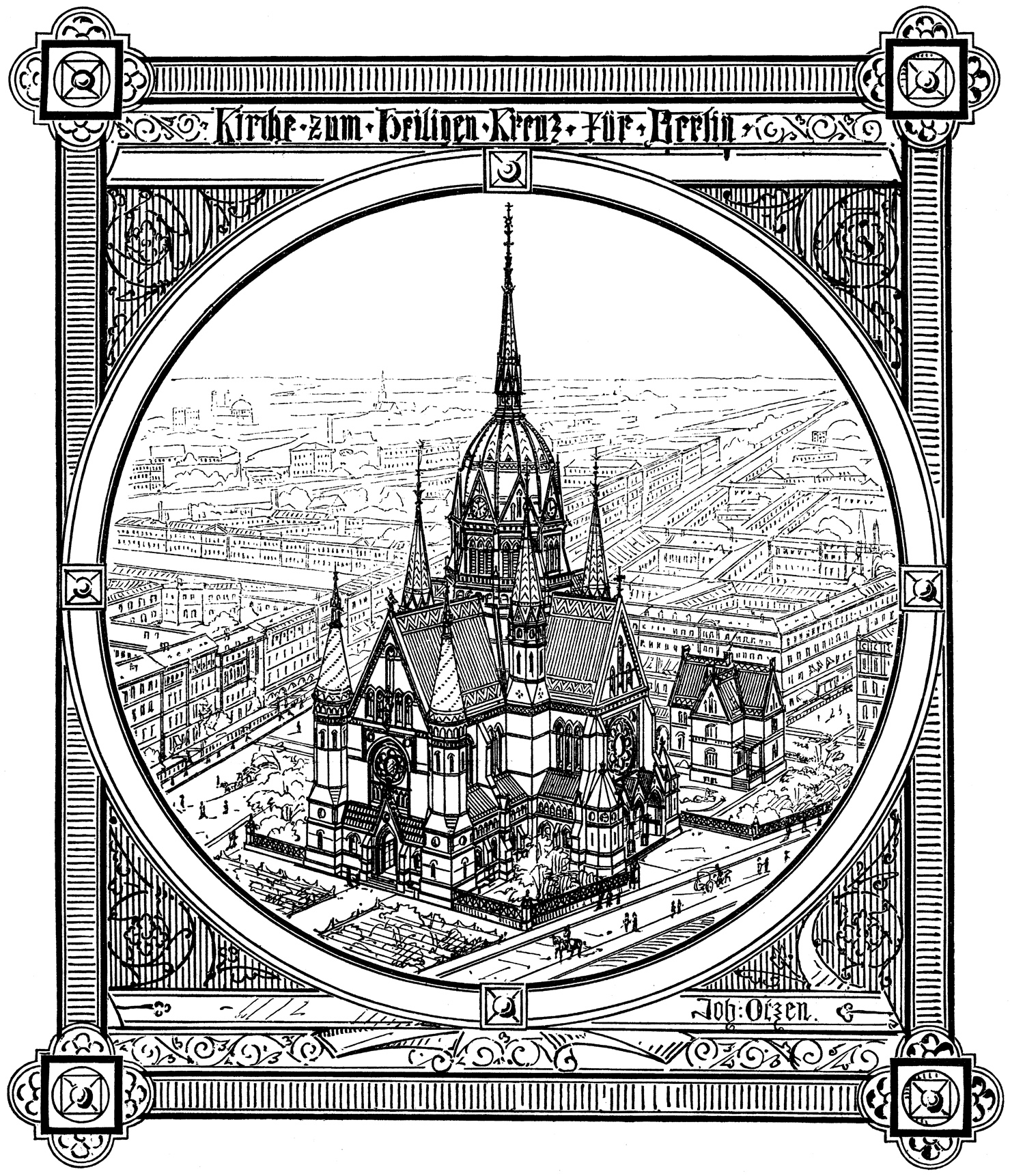 Zeichnung der Kirche zum Heiligen Kreuz in Berlin-Kreuzberg. Angefertigt vom Architekten der Kirche, Johannes Otzen.